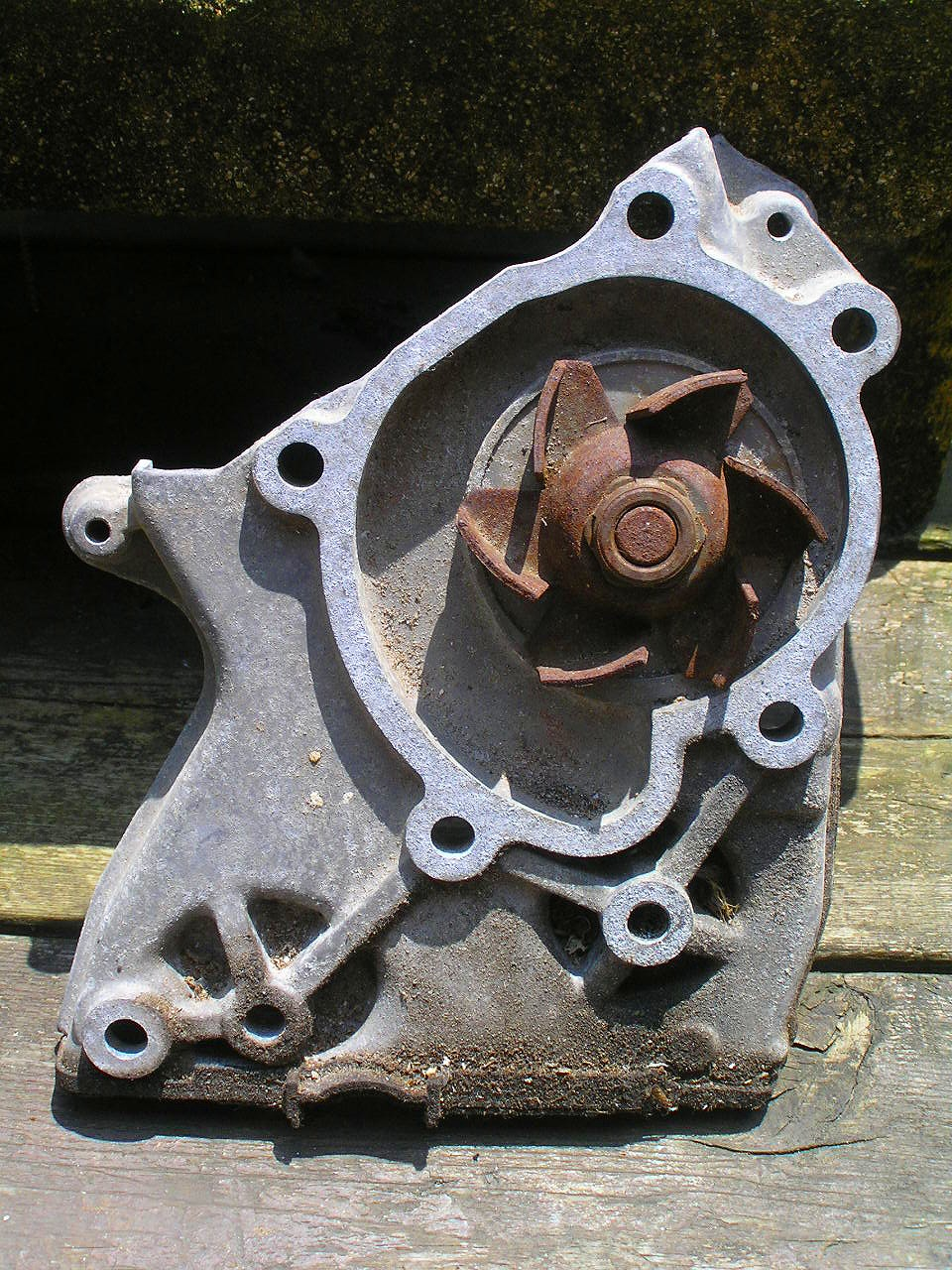 ウォーターポンプ（マツダカペラ）